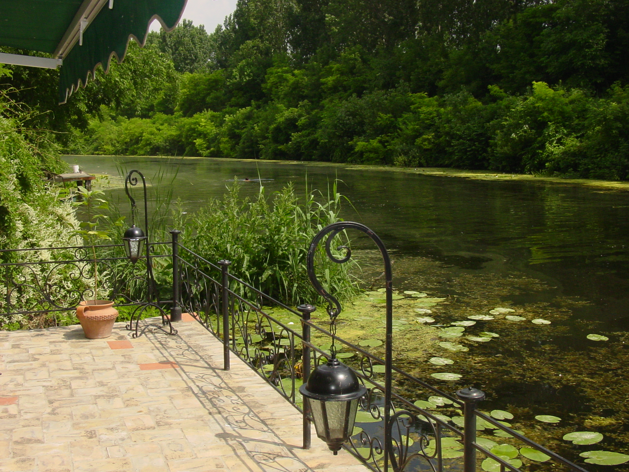 Great Bačka Chanel near Sombor